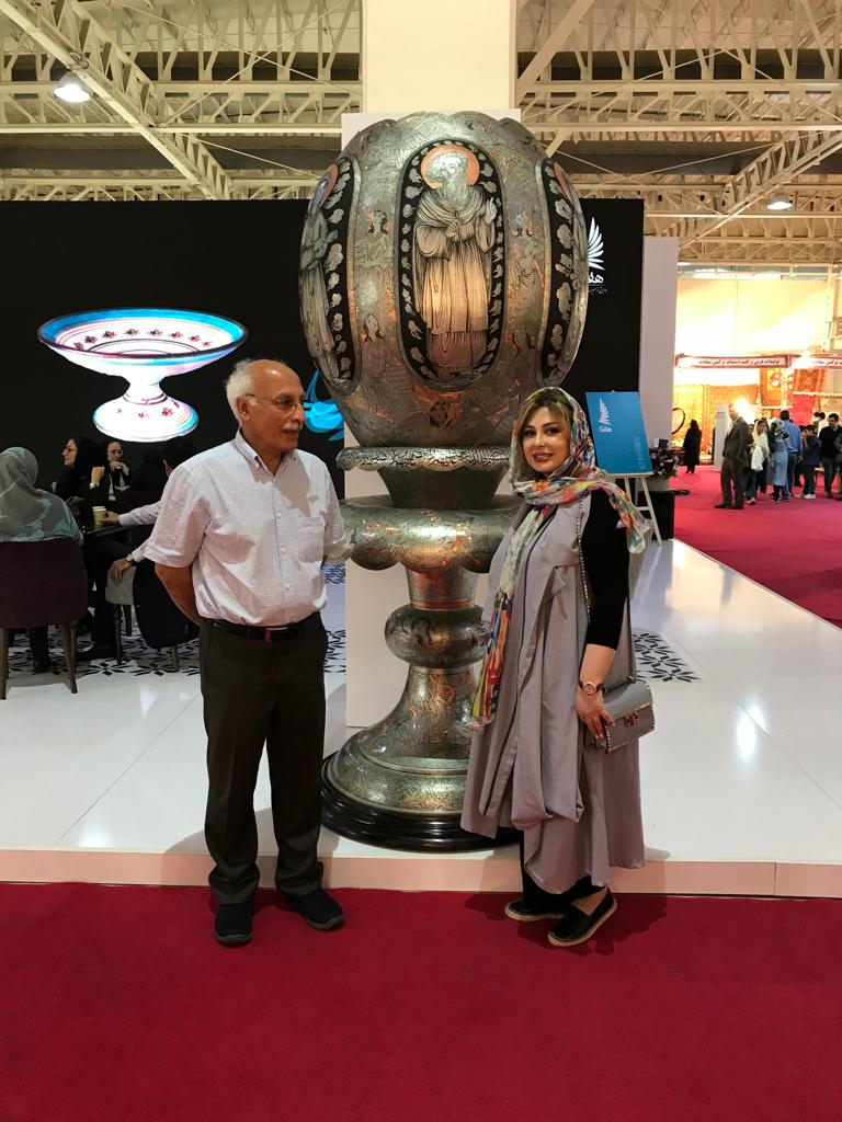 خانم ضیغمی در کنار اثار هنری غنچه انبیا